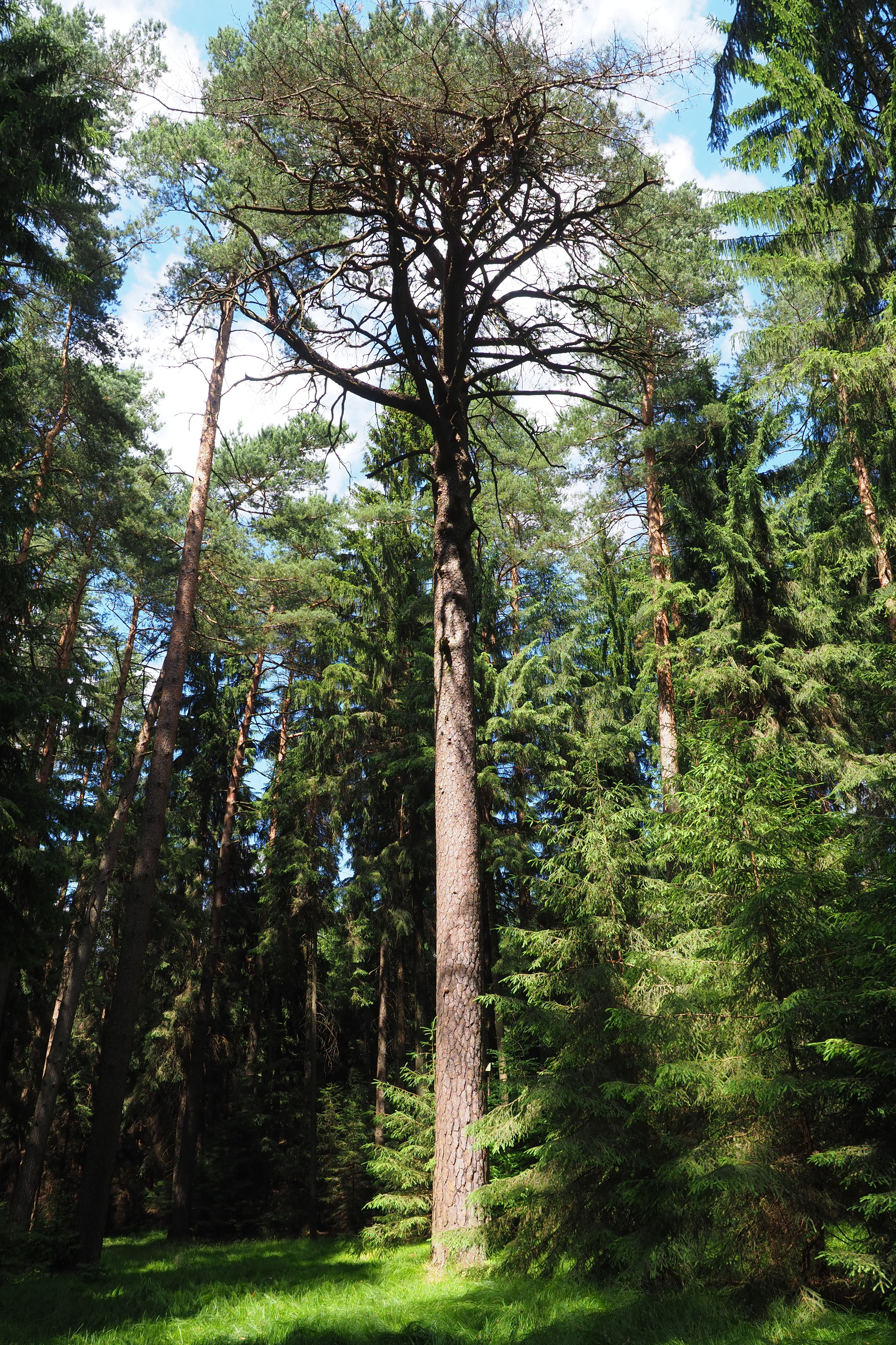 Alte Kiefer in der Dresdner Heide, Naturdenkmal